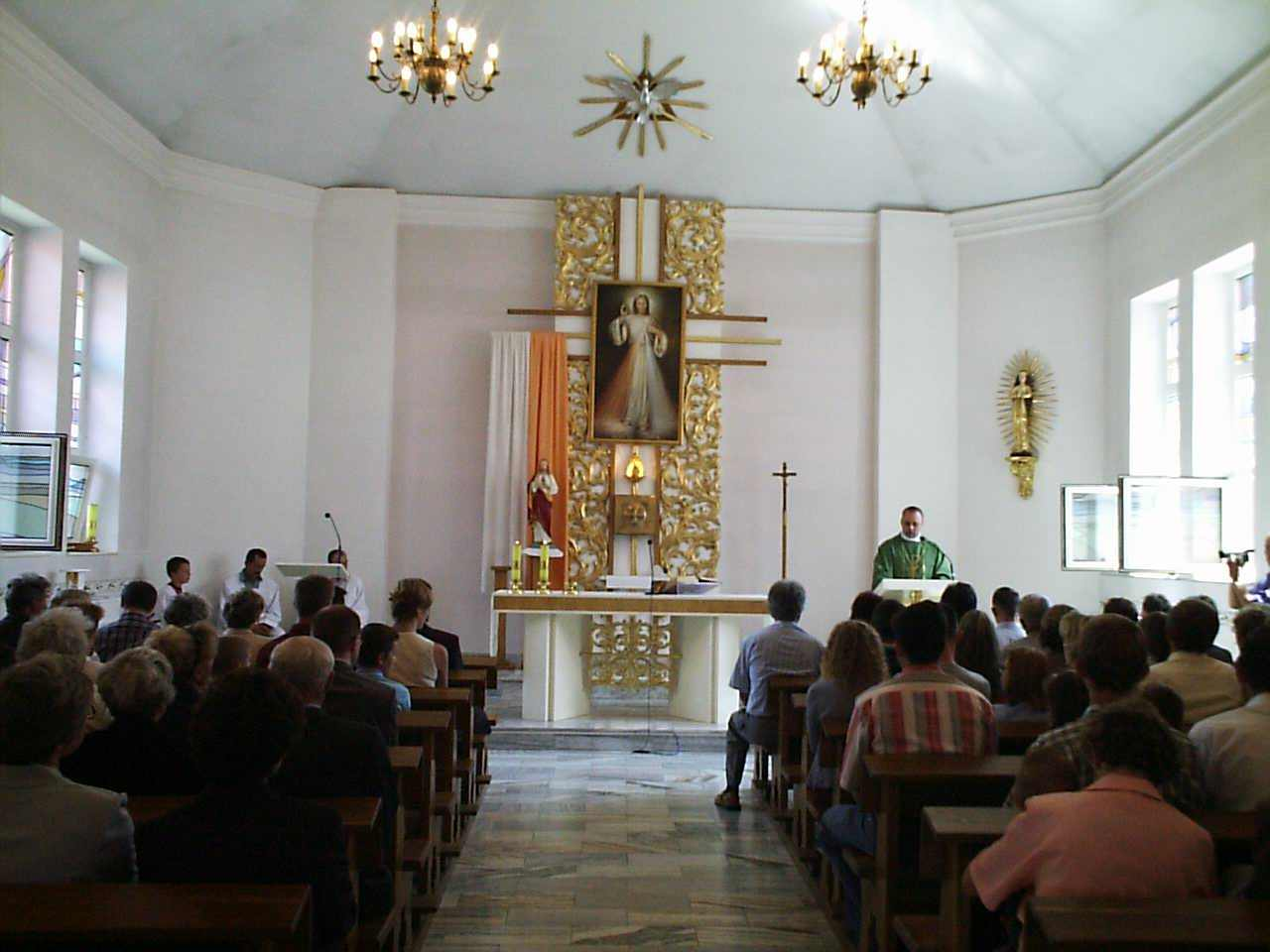 Sikórz k. Płocka, kaplica w Szkole Niższego Seminarium Duchownego i Niepubliocznego Gimnazjum Katolickiego